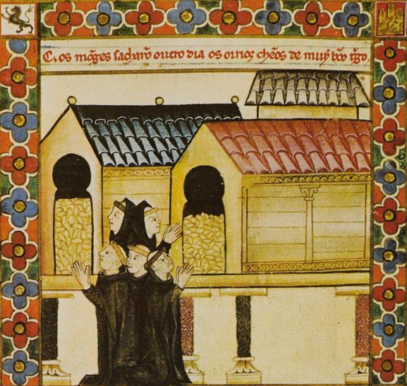 Cantiga de Santa María CLXXXVI - Monjes rezan ante hórreos llenos de grano.